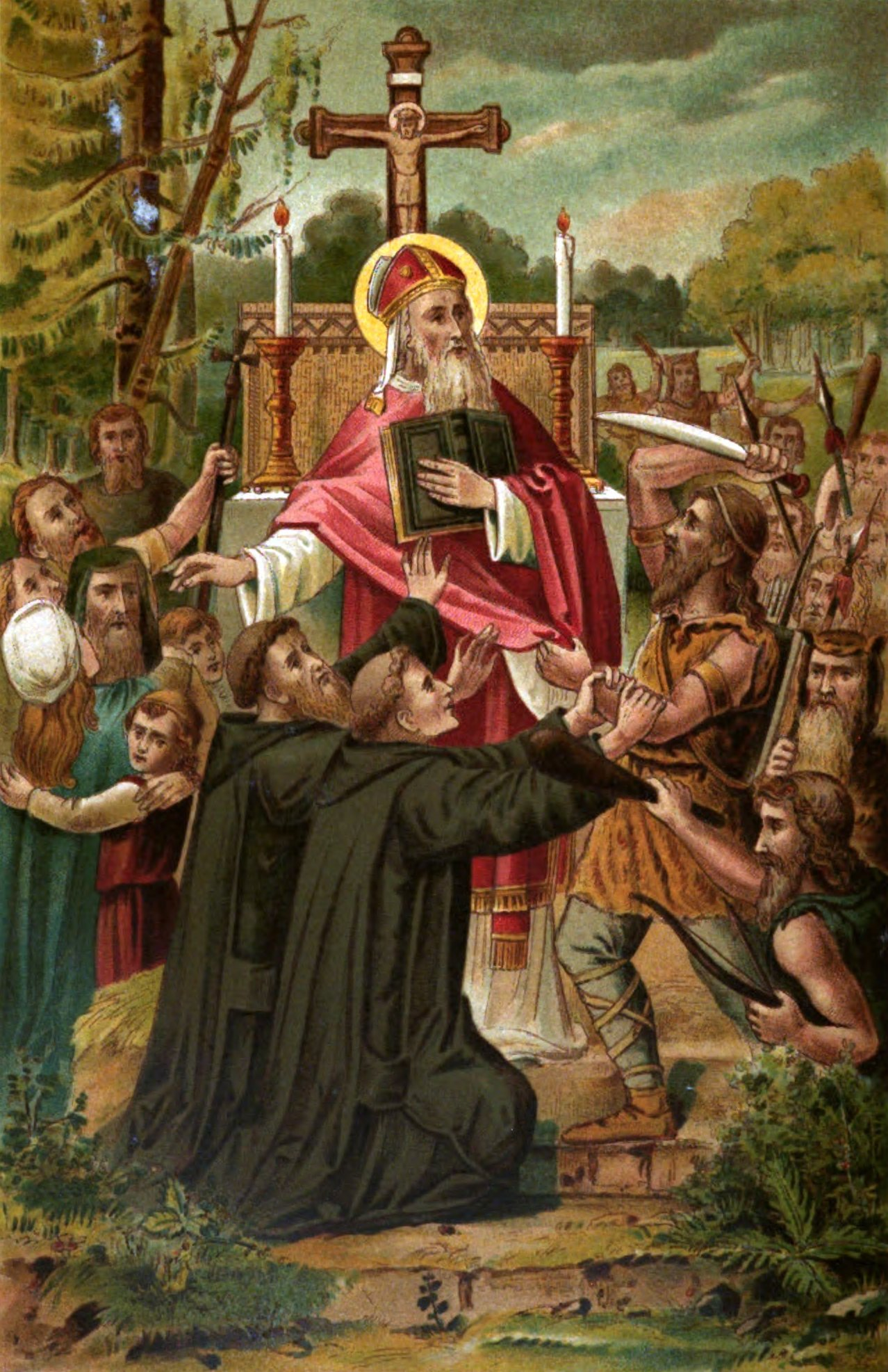 Marteldood van den H. Bonifacius